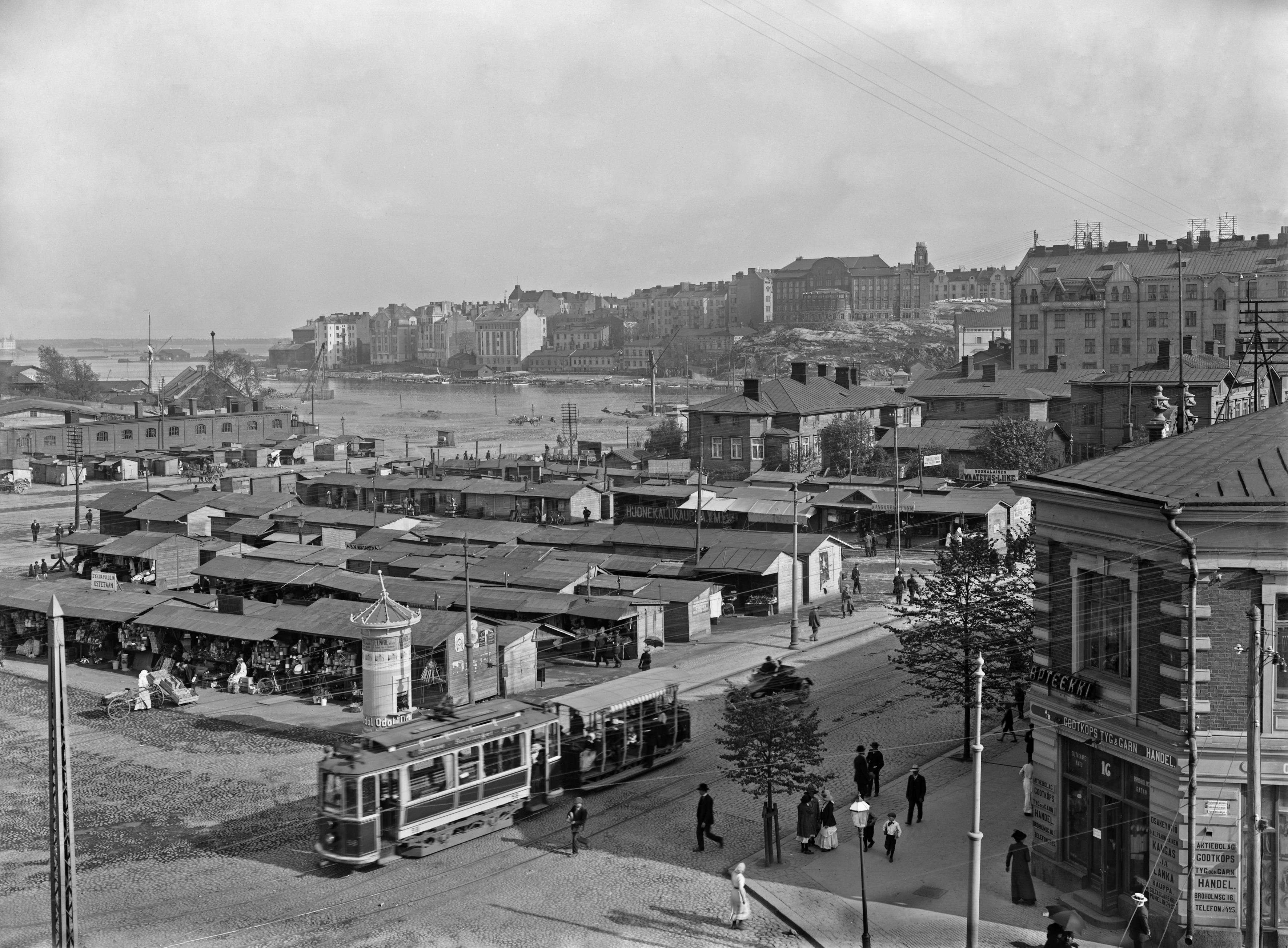 Hakaniementori. Taustalla Kruununhaka. Kuvattu Hämeenkatu 2a:sta (nykyinen Siltasaarenkatu 18). -- negatiivi ja vedos, lasi paperi pahvi, mv